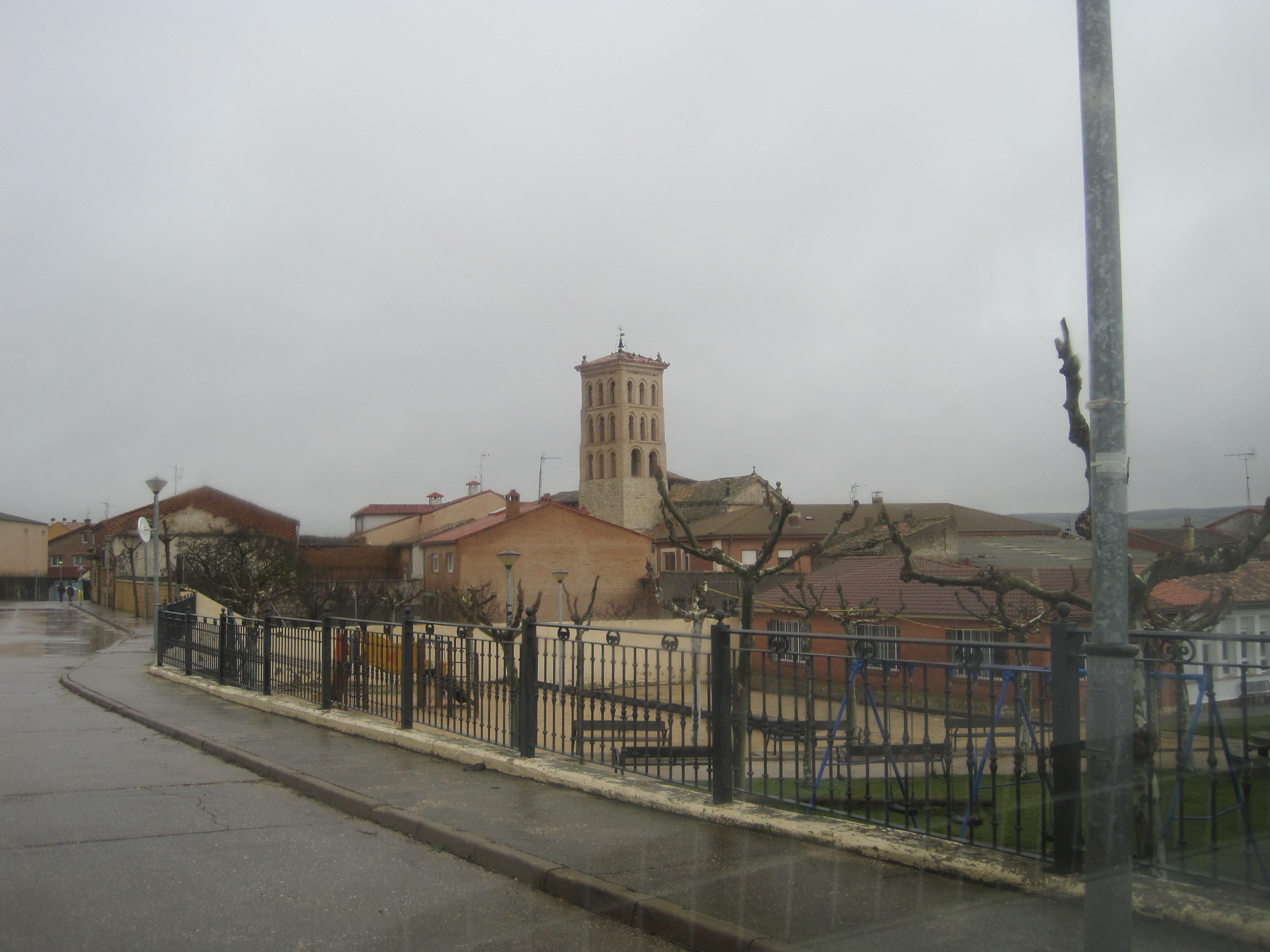 Foto del casco urbano de Arcos de la Llana (Burgos)